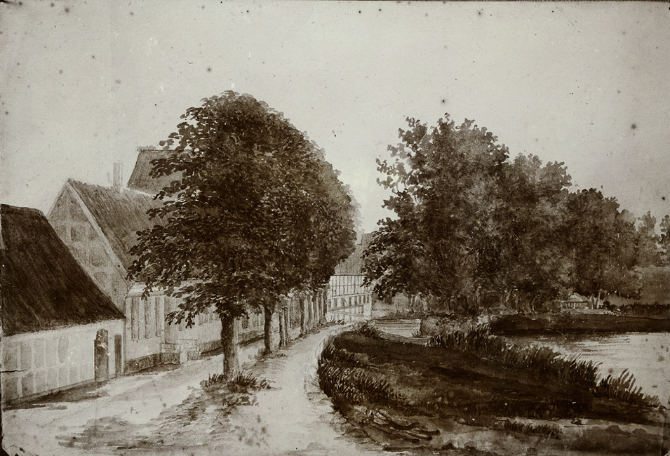 Aarhus Mølle 1860